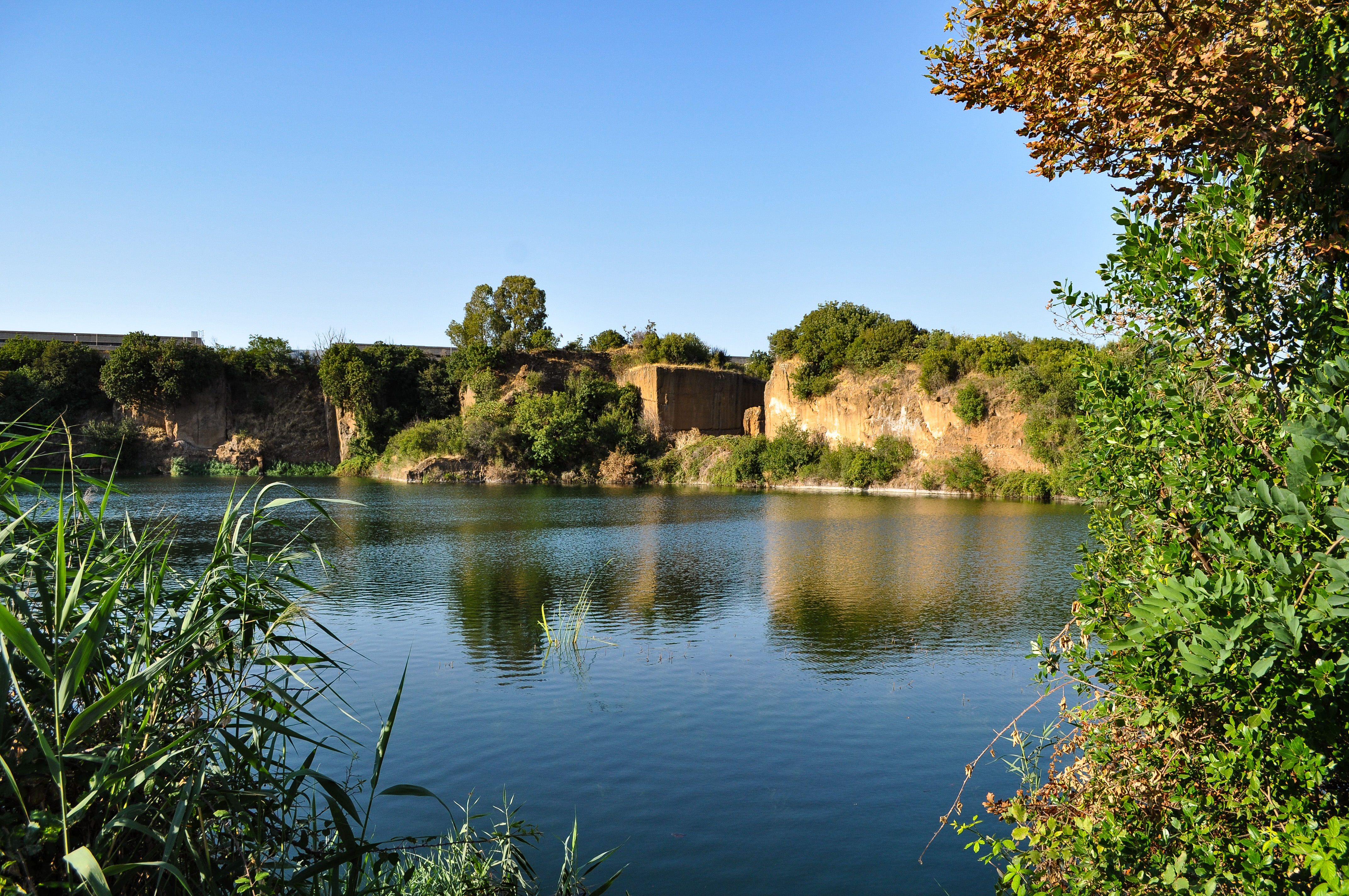 Scorcio del lago più grande delle Latomie di Salone.